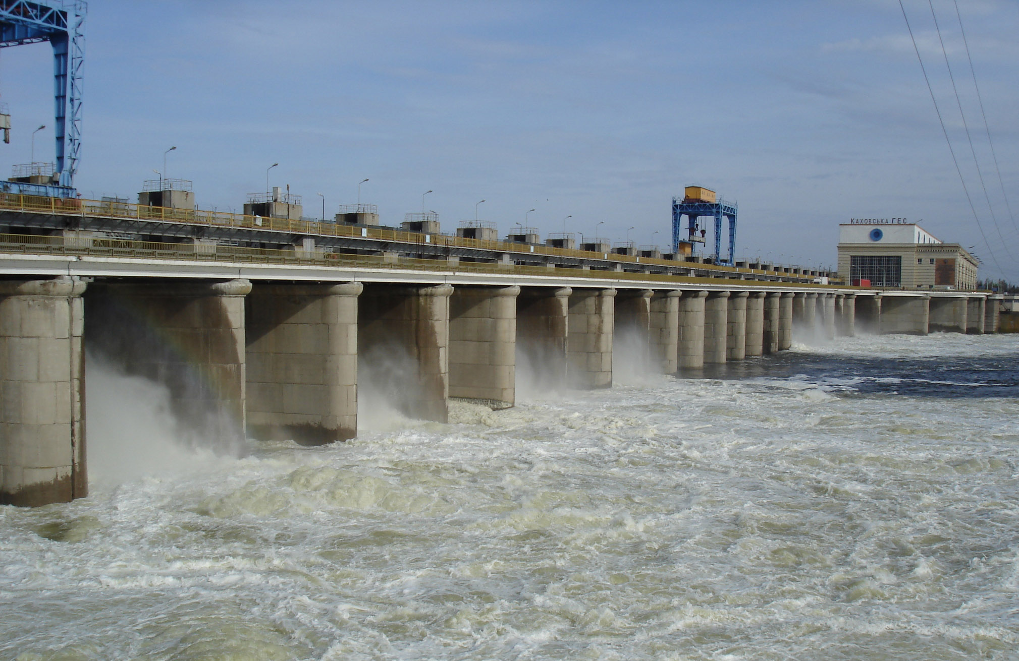 Сброс воды на плотине Каховской ГЭС